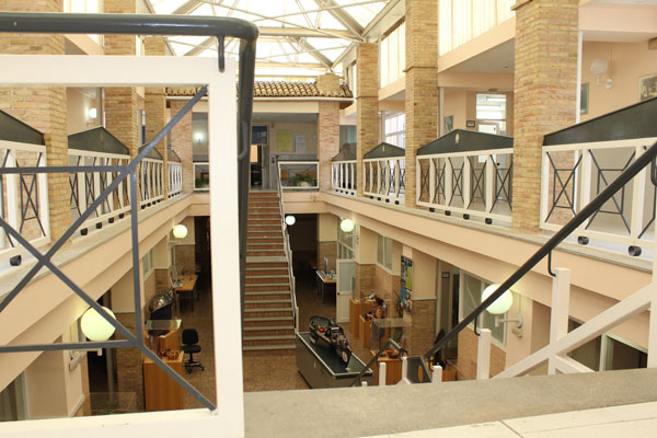 Sala principal del Hall de la Escuela